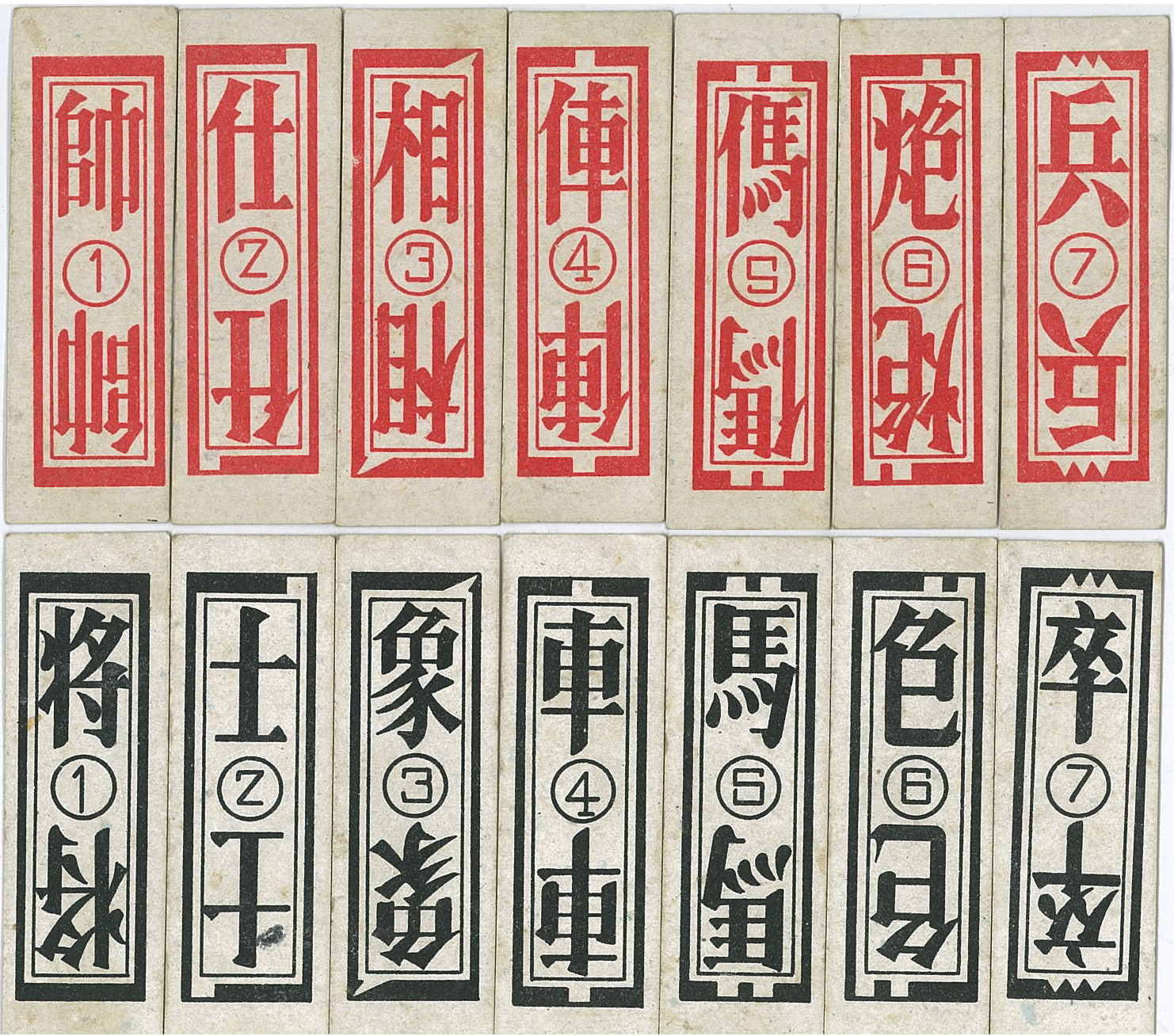 福建的釣魚牌